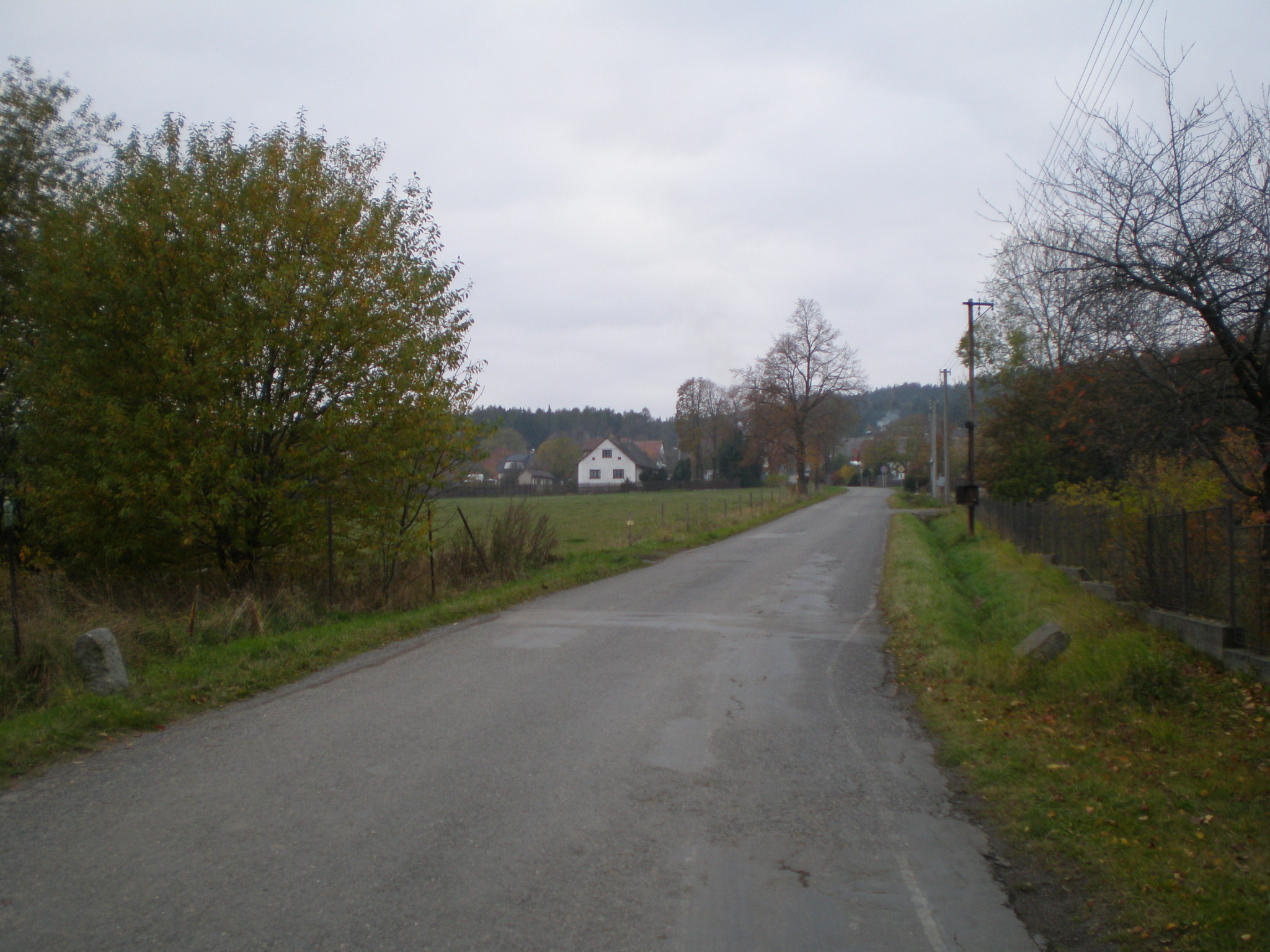 Orlov, Příbram